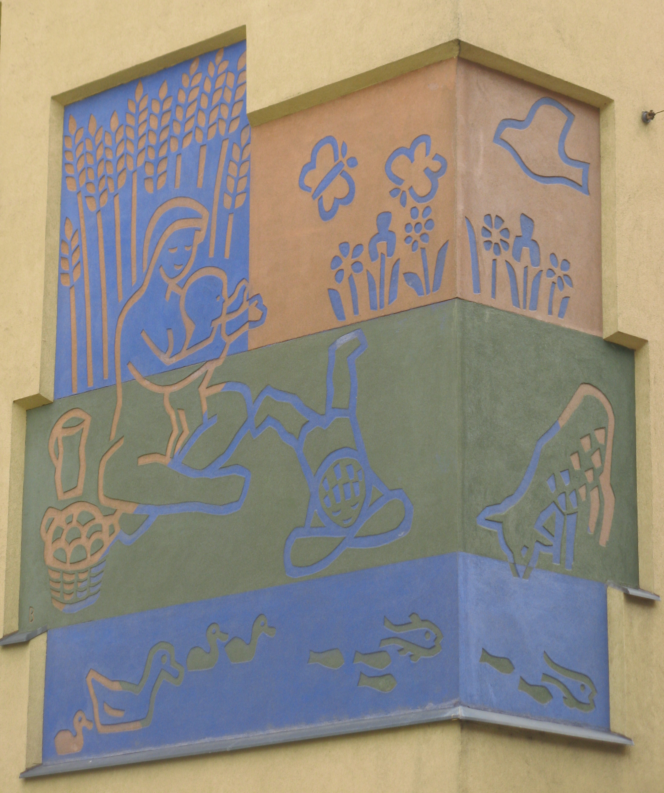 Mutter mit Kindern (1954), Sgraffito von Eduard Bäumer, Herzgasse 101, Wien-Favoriten